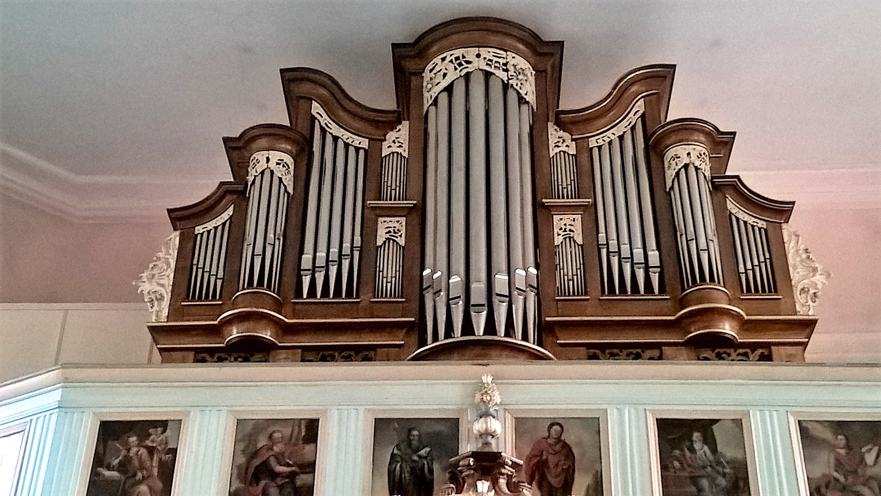 Orgel von St. Gangolf Bobenhausen II, Vogelsbergkreis, Hessen, Deutschland